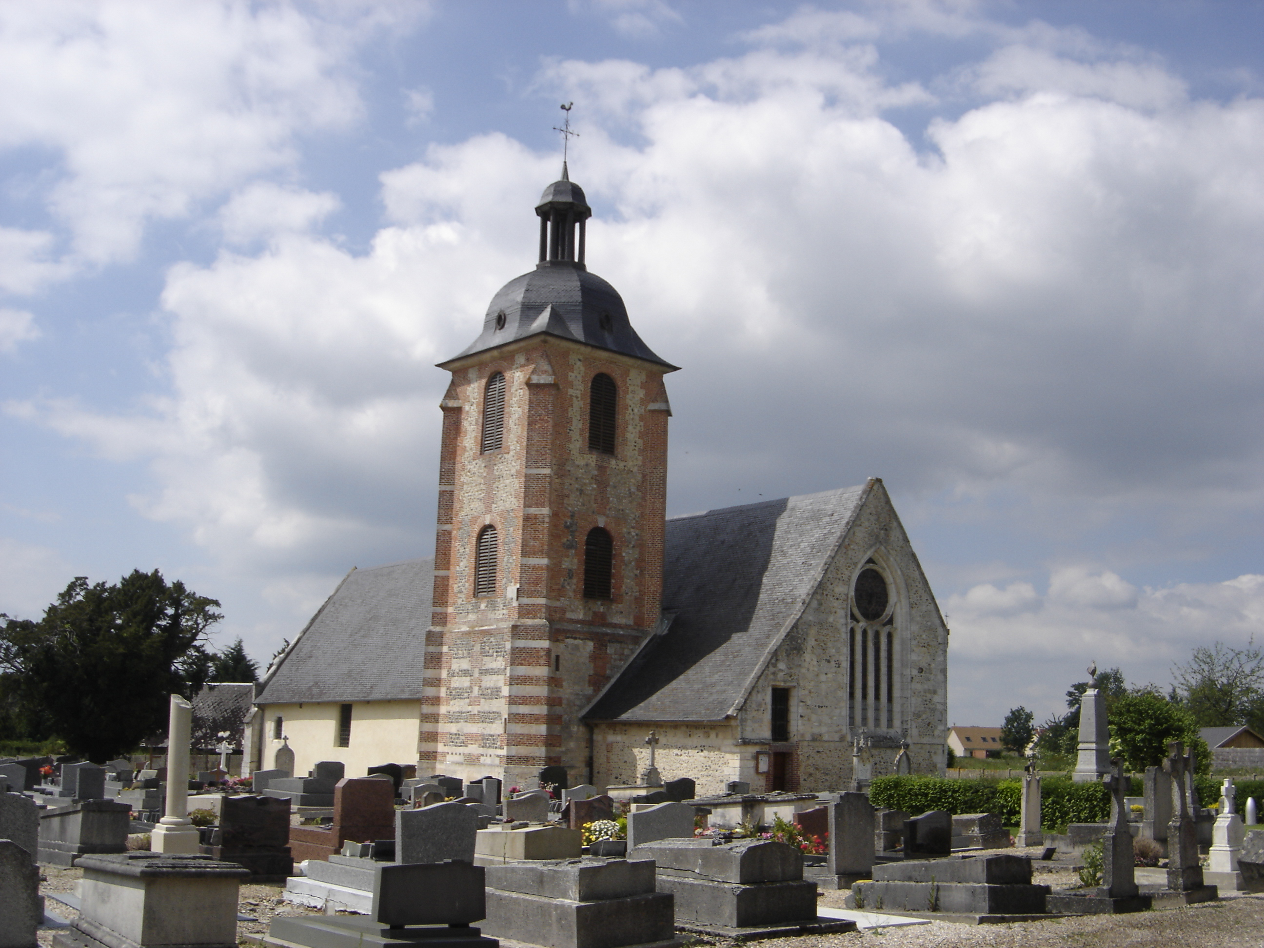 église Notre-Dame de Campigny (Eure - France)